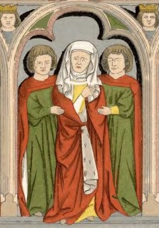 Matylda Brandenburska